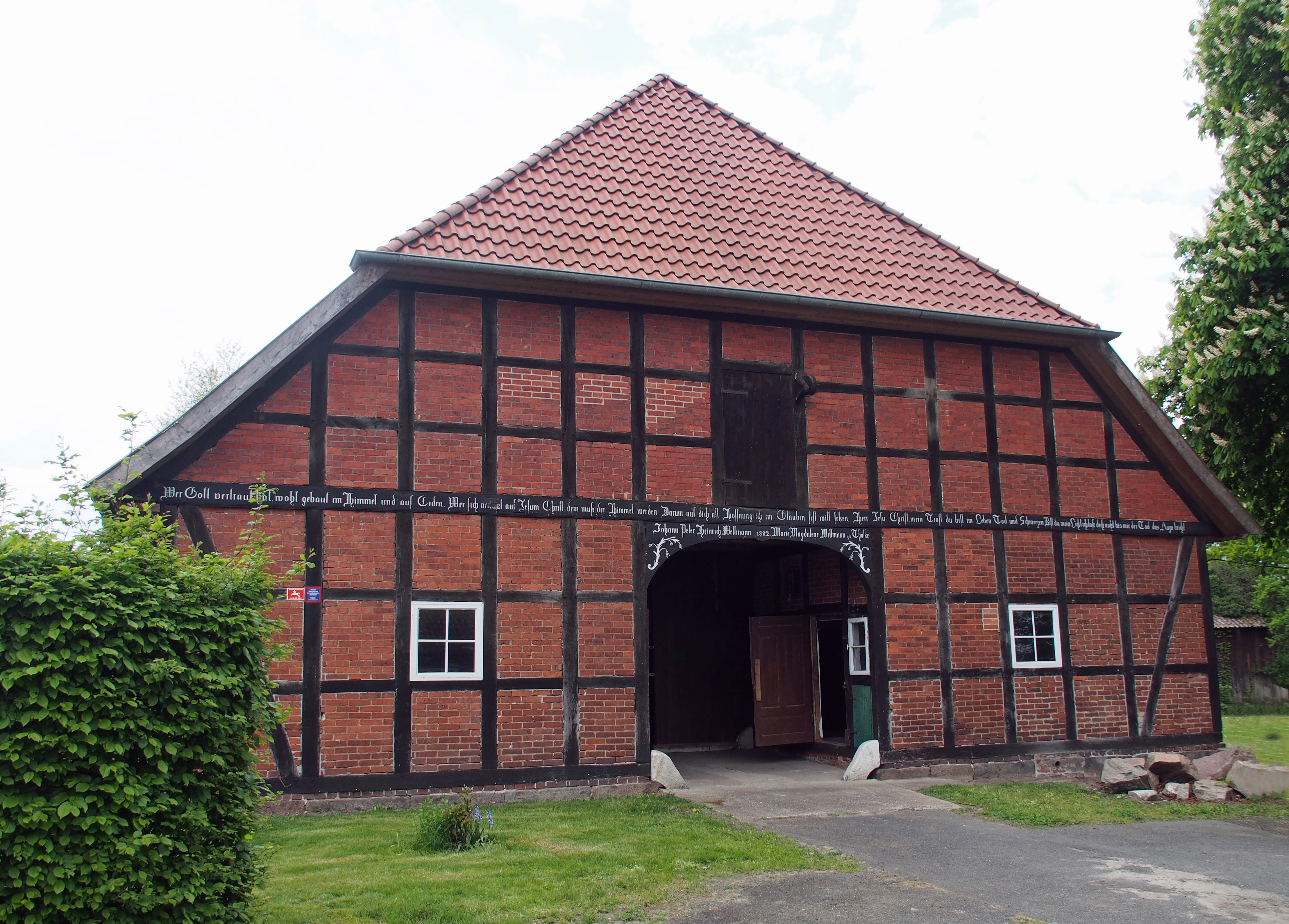 Denkmalgeschütztes Bauernhaus in Eversen, Stadt Bergen (Niedersachsen)